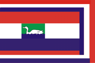 De oude vlag van Waterland.